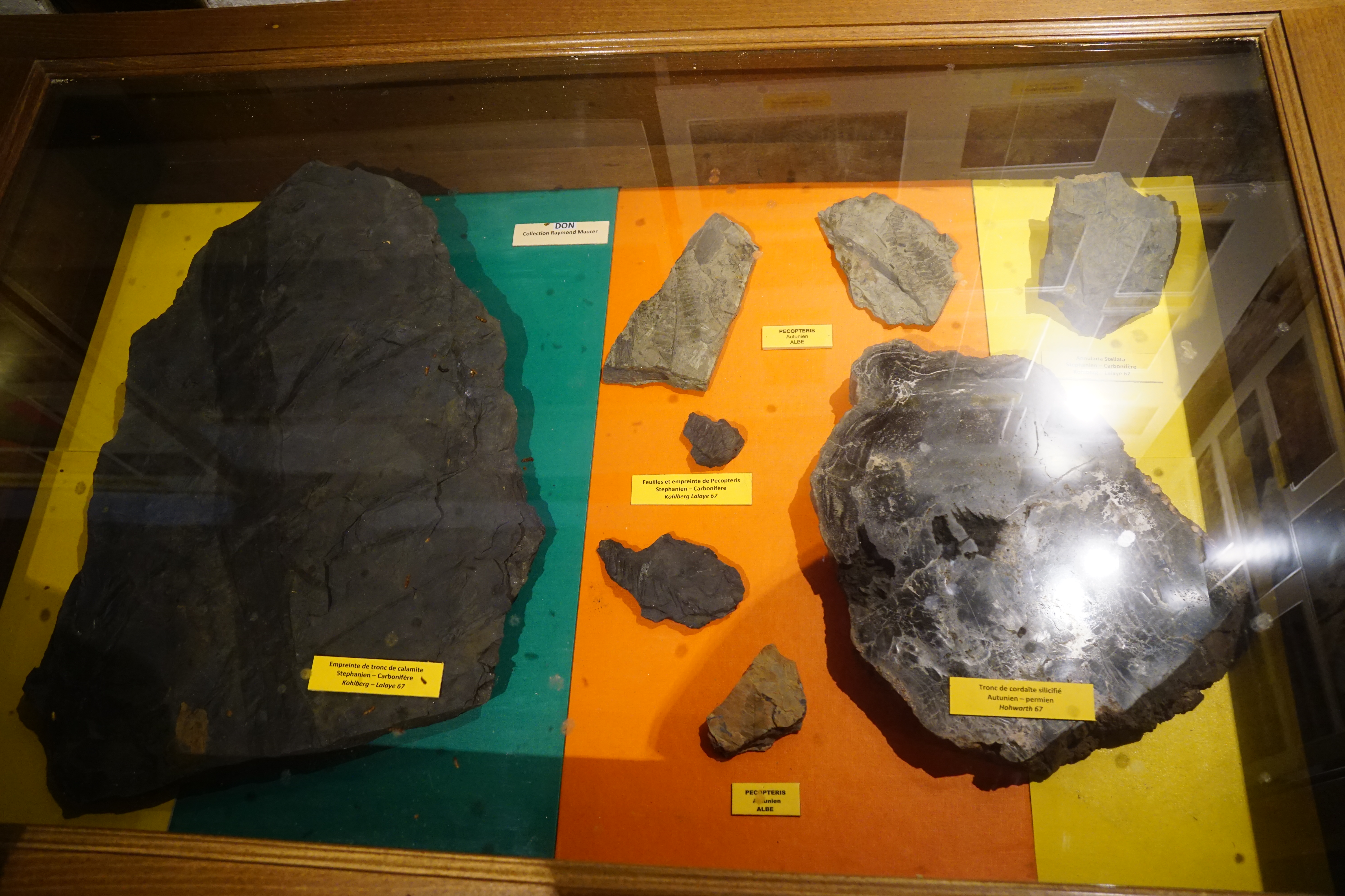 Maison de Val de Villée : échantillons du Stéphanien-Autunien-Permien, notamment du Kohlberg.